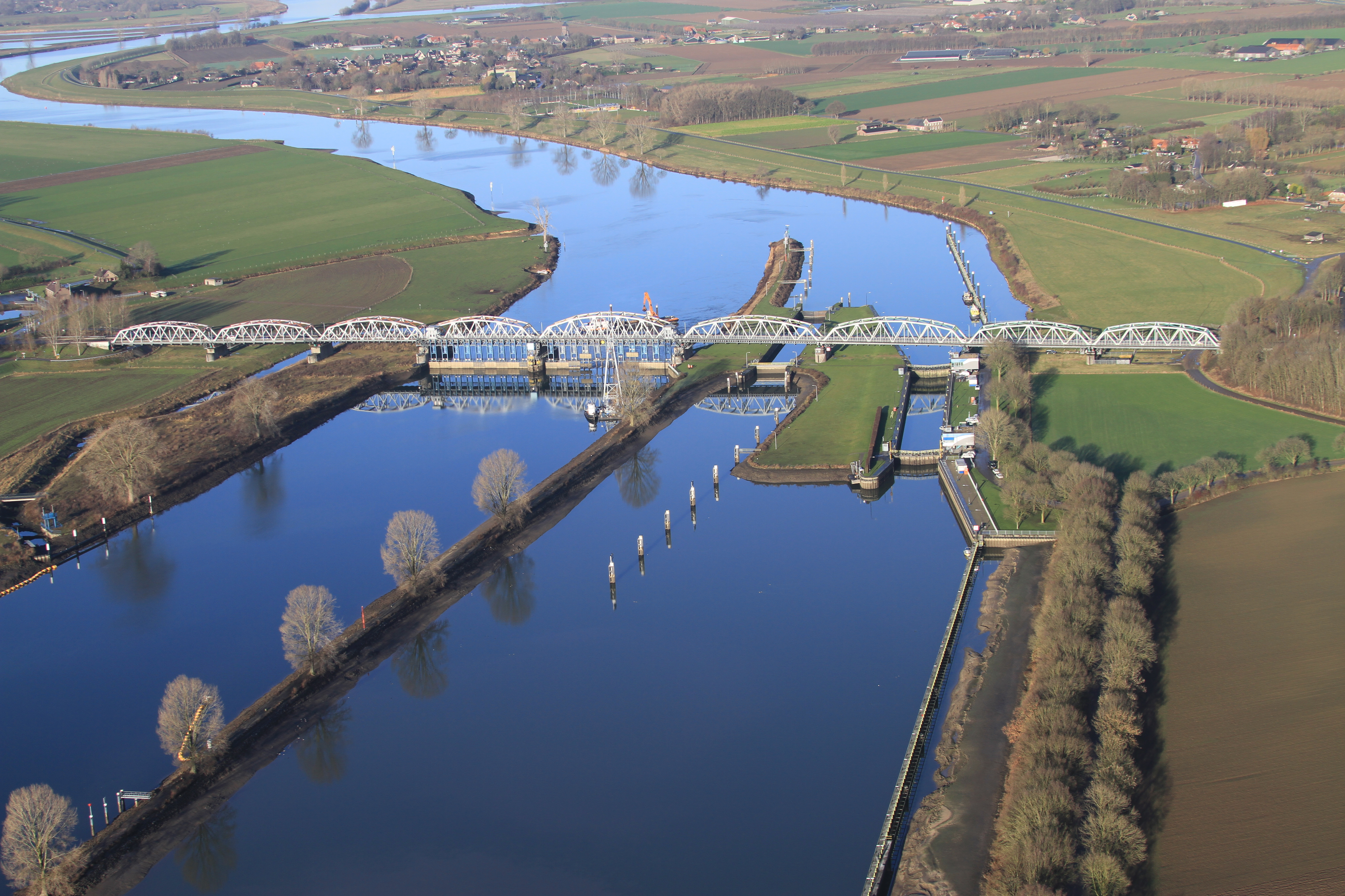 Stuw- en sluizencomplex Grave